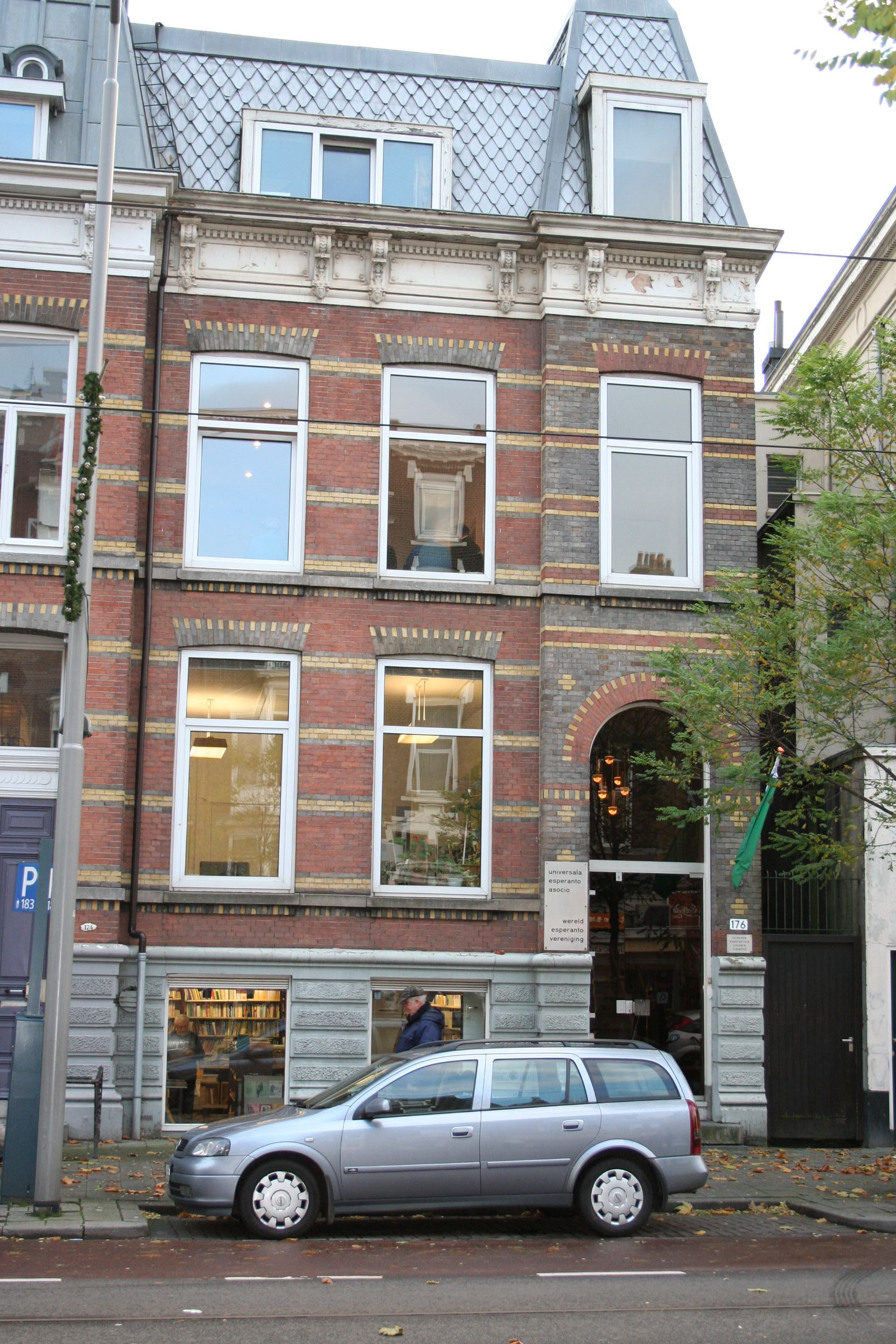 Centra Oficejo de UEA.